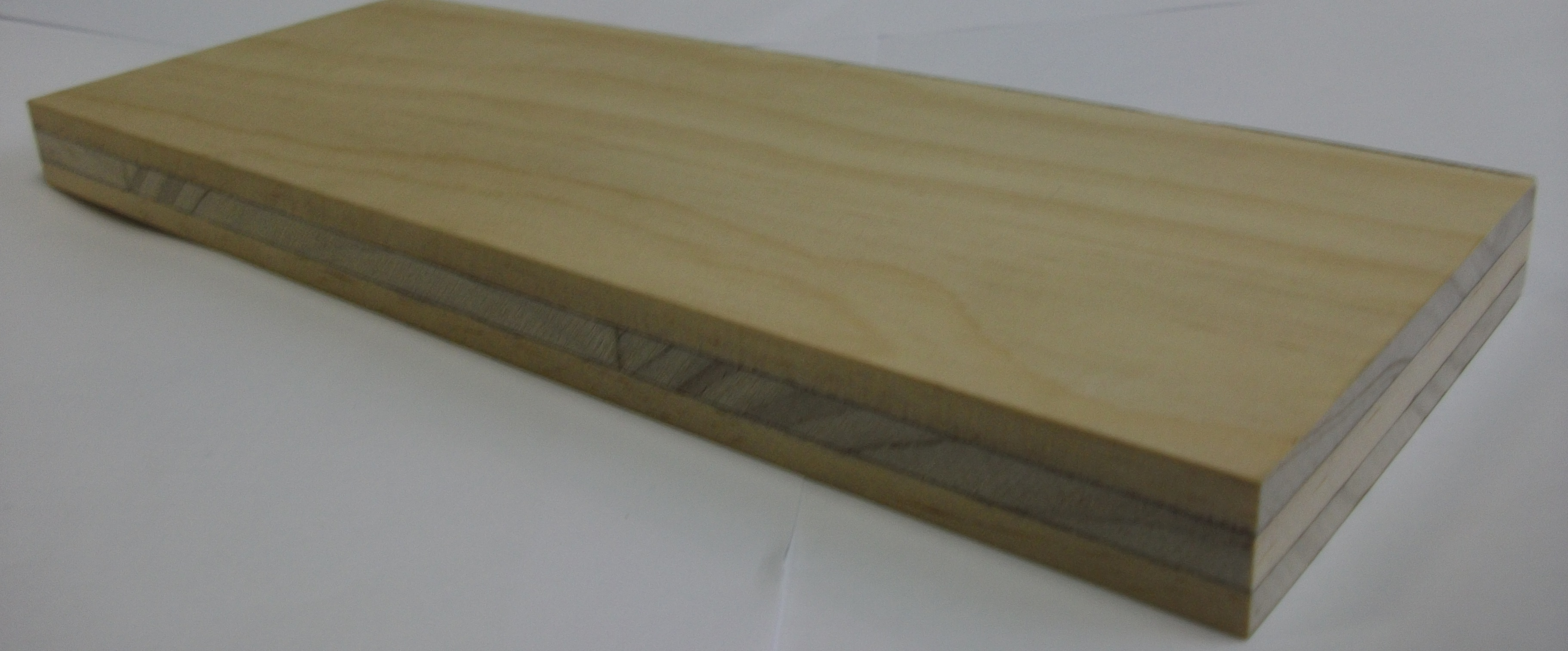 Accoya 3-Schichtplatte